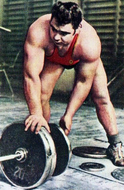 CAMPIONI DELLO SPORT PANINI 1970 1971 48 VASSILI ALEXEJEV SOLLEVAMENTO PESI R